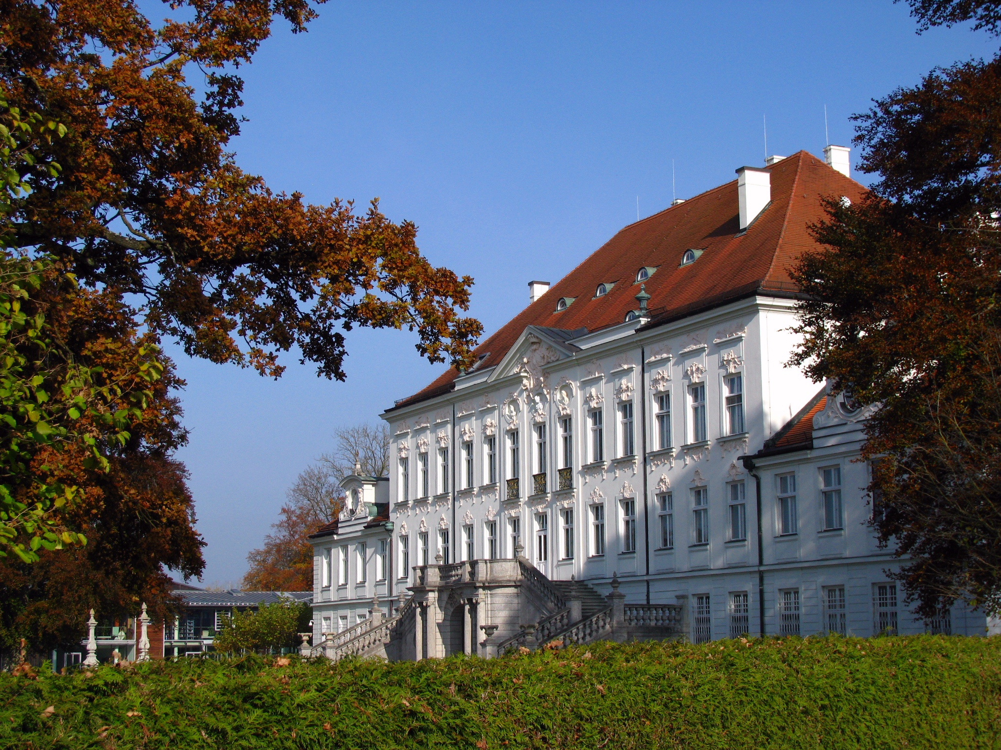 Schloss Haimhausen im Landkreis Dachau